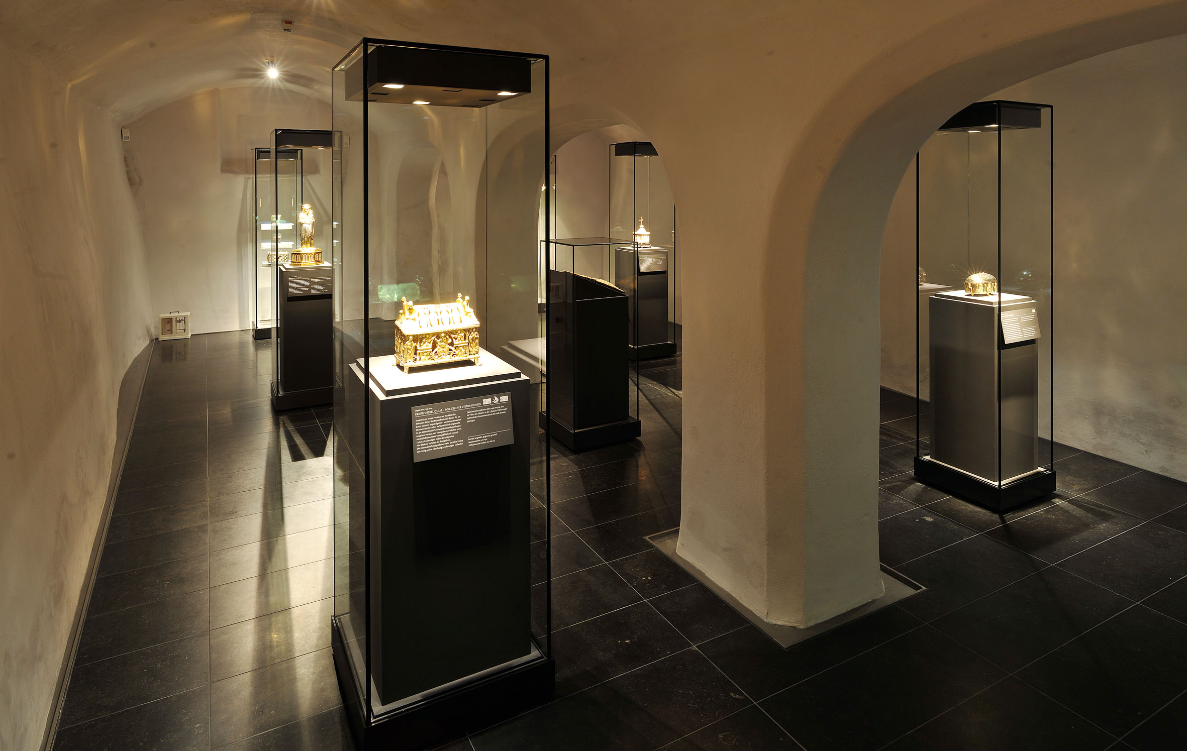 StiftsMuseum Xanten, Raum 3